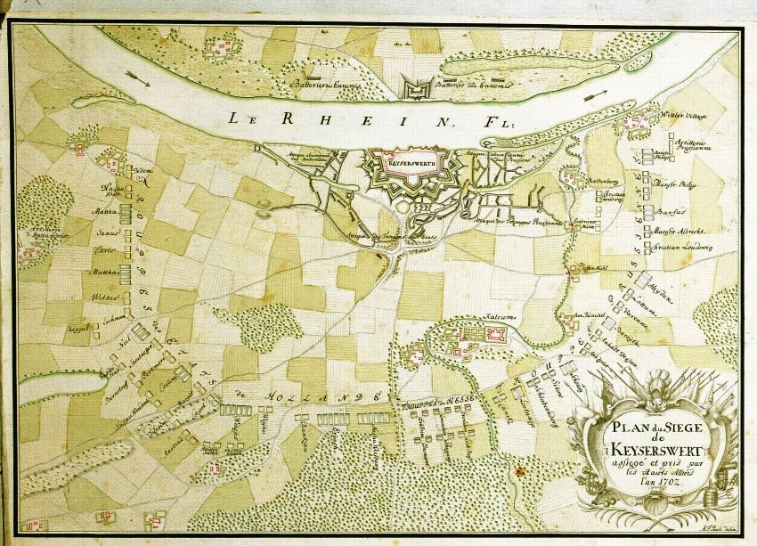 Originaltitel: Plan du siege de Keyserswert assiegé et pris par les Hauts Allieés l'an 1702; Dargestellt wird die Belagerung von Kaiserswerth durch holländische und preußische Truppen im Jahr 1702. Der Plan ist nach Westen ausgerichtet und zeigt den den Grundriss von Kaiserswerth mit den Stellungen und Namen der Regimenter sowie das Ortslager bei Kalkum (kolorierte Handzeichnung)